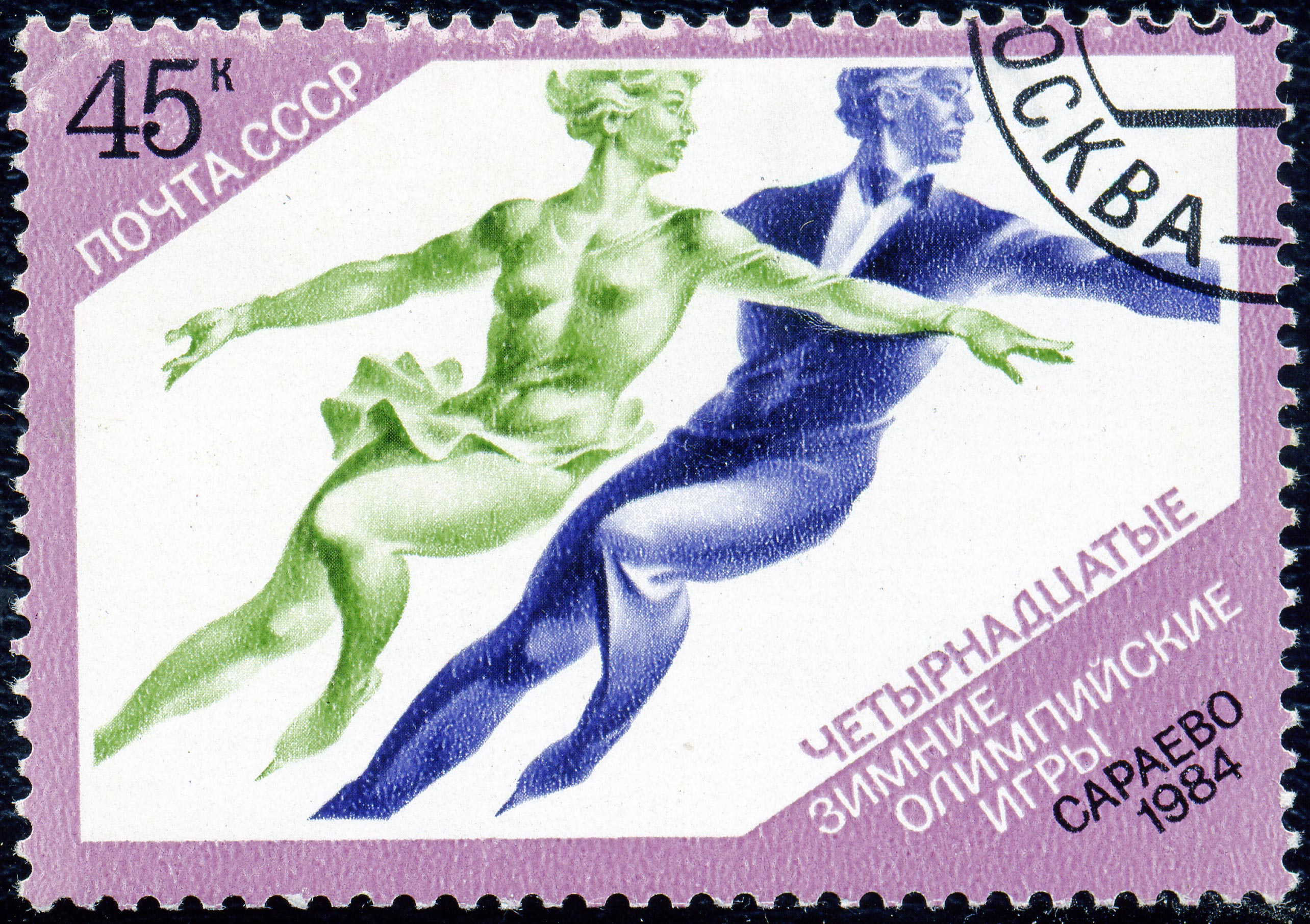 Почтовая марка СССР. 1984. XIV Зимние Олимпийские игры. Фигурное катание